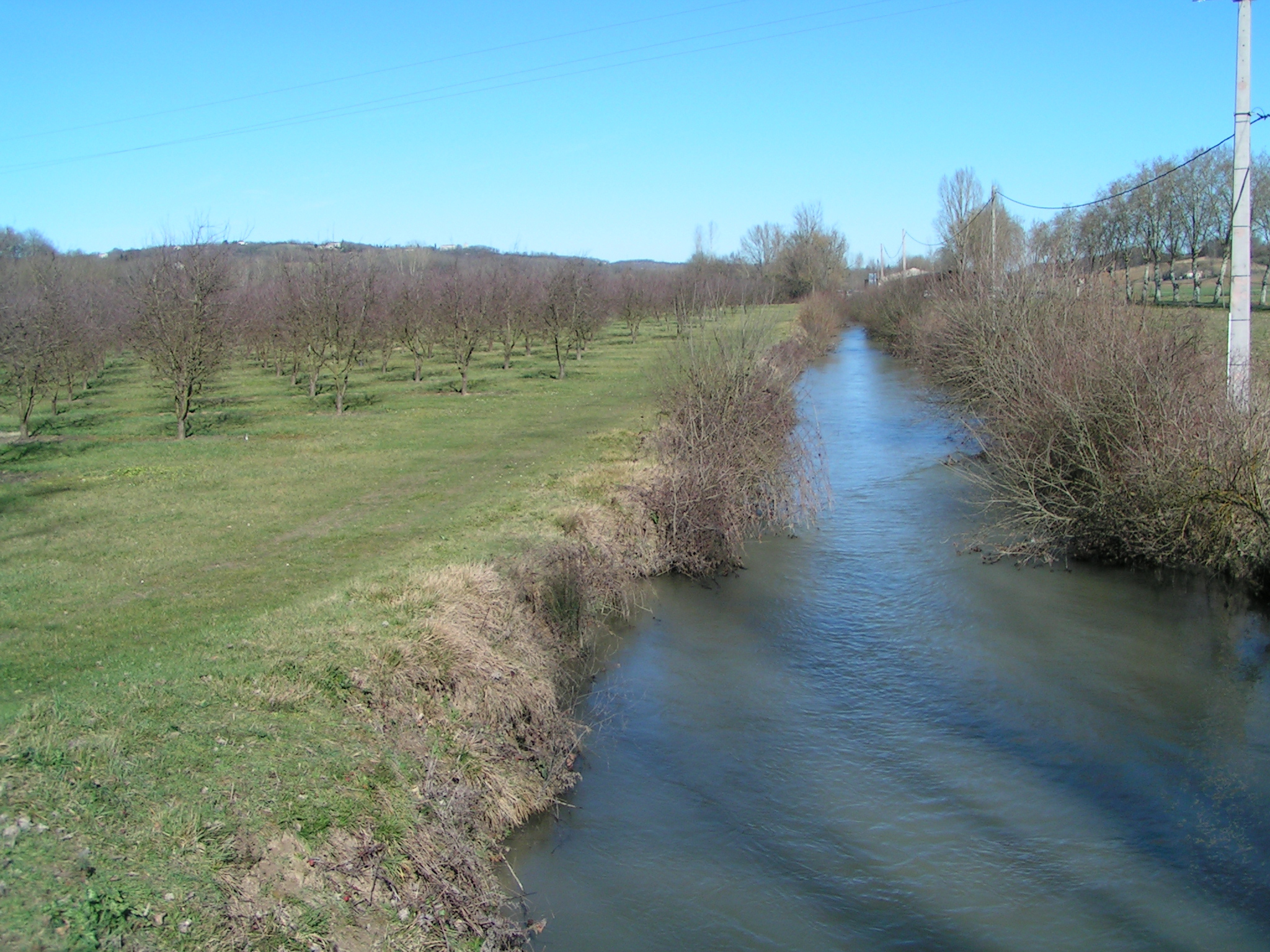 Vallée de la Barguelonnette